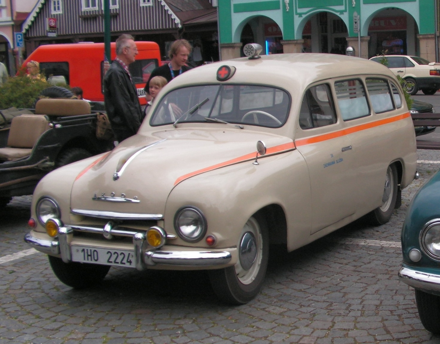 Škoda 1201 sanita na akci "Tatra v Českém ráji"